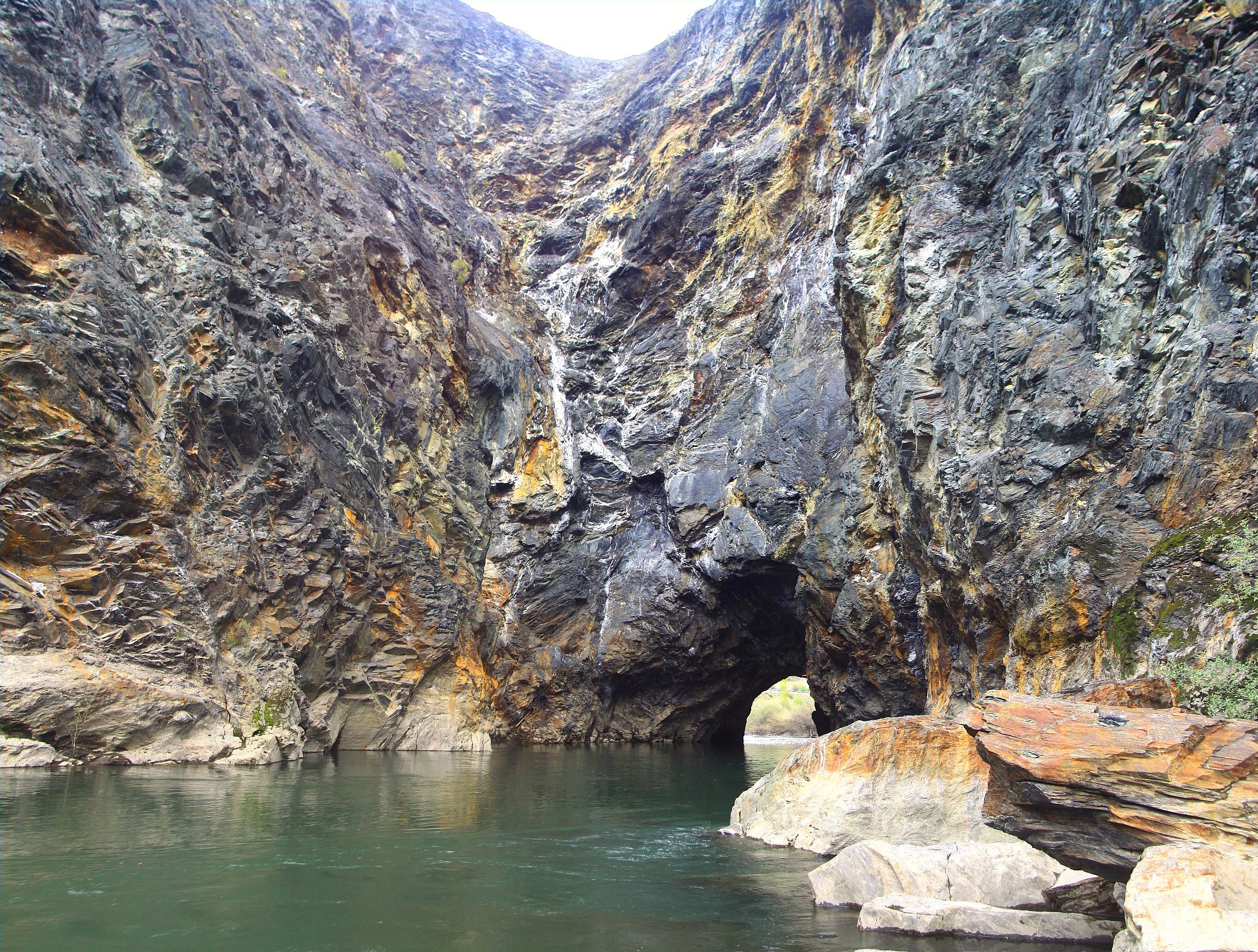 Río Sil, Montefurado, Quiroga Túnel romano por el que atraviesa el río Sil se construyó en el siglo II, en los tiempos del Emperador Trajano, para desviar el cauce del río, y poder extraer el oro que este arrastraba lavando el lodo de la antigua cuenca. Tiene unos 400 m. de largo por 19 de ancho y una altura media de 17 m. Una difícil obra de ingeniería para la época. Se dice que los romanos talaron el bosque de encinos que había en un pueblo cercano que todavía conserva el topónimo de Enciñeira para romper la roca a fuego. Estos romanos estaban acampados en un pueblo que se llama Sesmil, el nombre viene de la legion romana por lo de Seismil que era una agrupación de gurreros. El túnel de Montefurado está apenas a cien metros de la carretera nacional 120, hay un área de descanso que permite detenerse y ver el túnel. Obtenido de " geolocalización correcta : 42º 23 25.63" N 7º 12 30.56" O